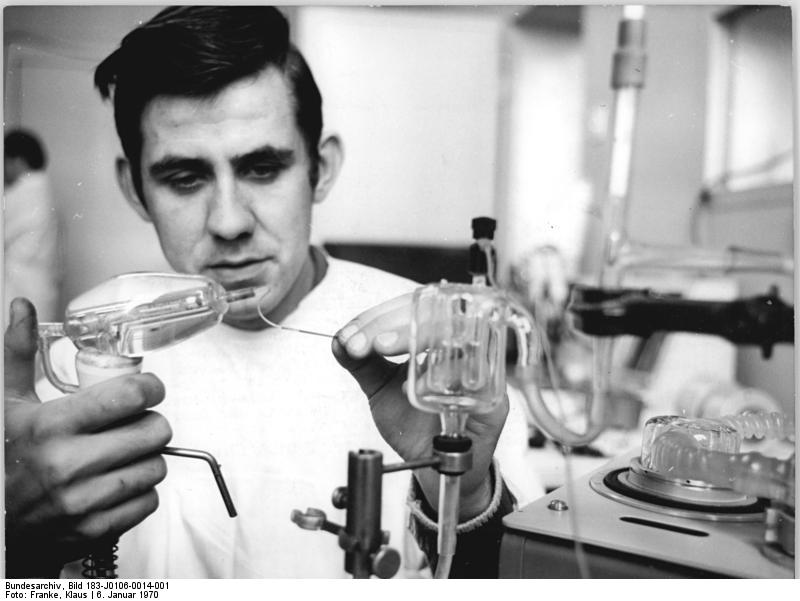 Berlin, Charité, Nierenzentrum, Blutprobe Zentralbild Franke 6.1.70-kat-Berlin: Nierenzentrum der Charité- Die Blutanalyse ist ein wichtiges diagnostisches Verfahren bei der Betreuung von Patienten mit chronischen Nierenerkrankungen und innerhalb der Notfall-Diagnostik. Der Medizinisch-technische Assistent Werner Sobottka mißt den pH-Wert des Blutes mit einer in der DDR entwickelten Spezialapparatur in der Abteilung für kardio-pulmonale Funktionsdiagnostik (Leiter: Prod. Dr. Anders) der II. Medizinischen Universitätsklinik der Charité (Direktor: Prof. Dr. Dutz). Bitte beachten Sie dazu auch unsere Fotos Nr. J 0616-12 und 13-1N